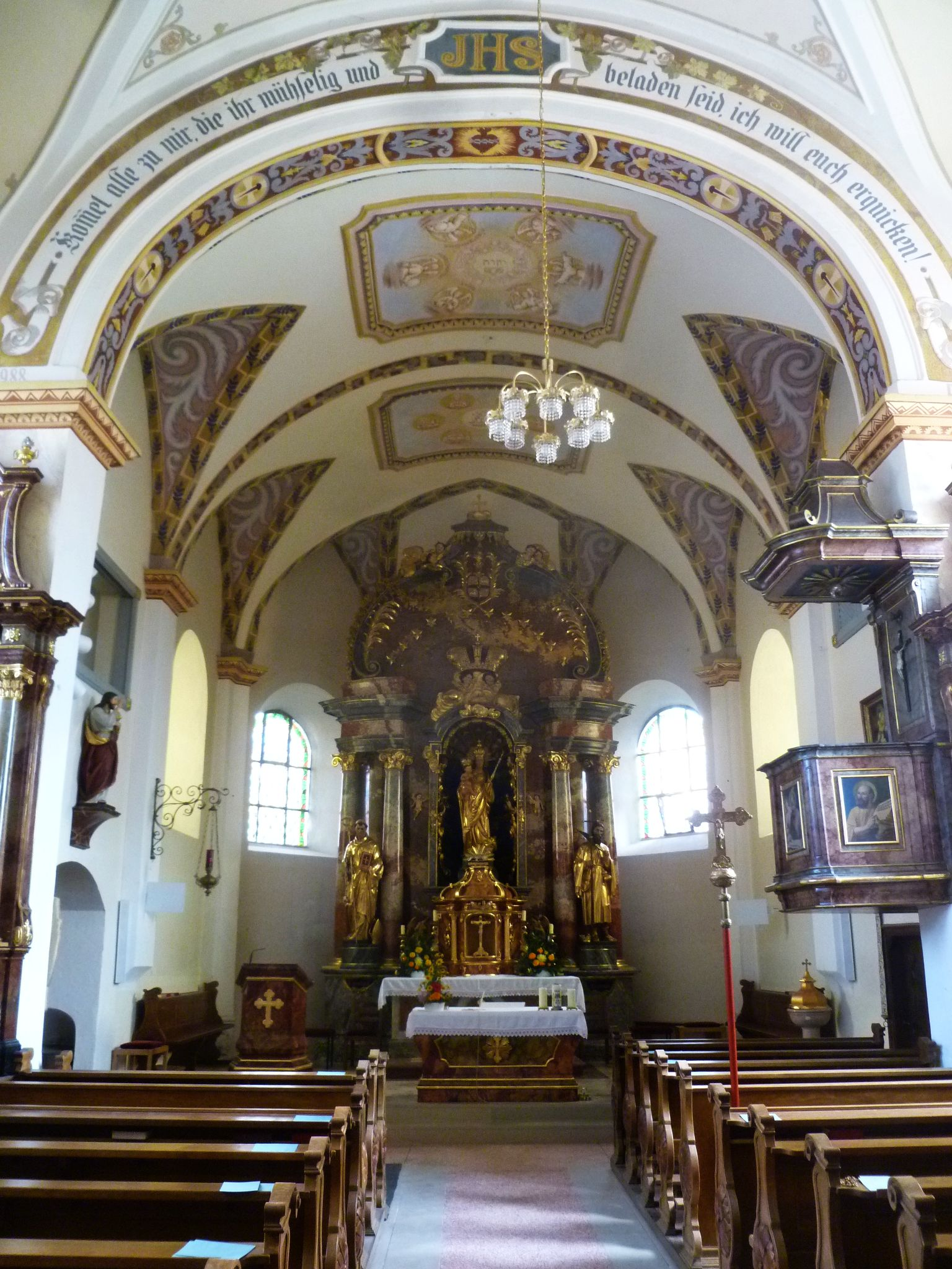 Kath. Filialkirche hl. Koloman